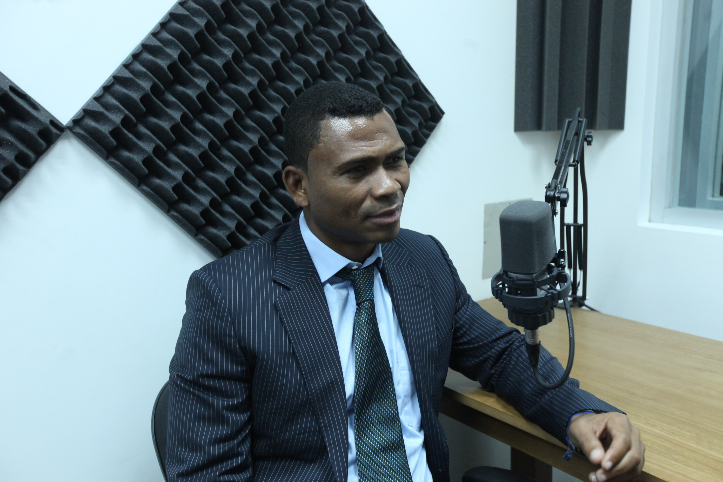 Foto: Hugo Ortiz Ron / Asamblea Nacional